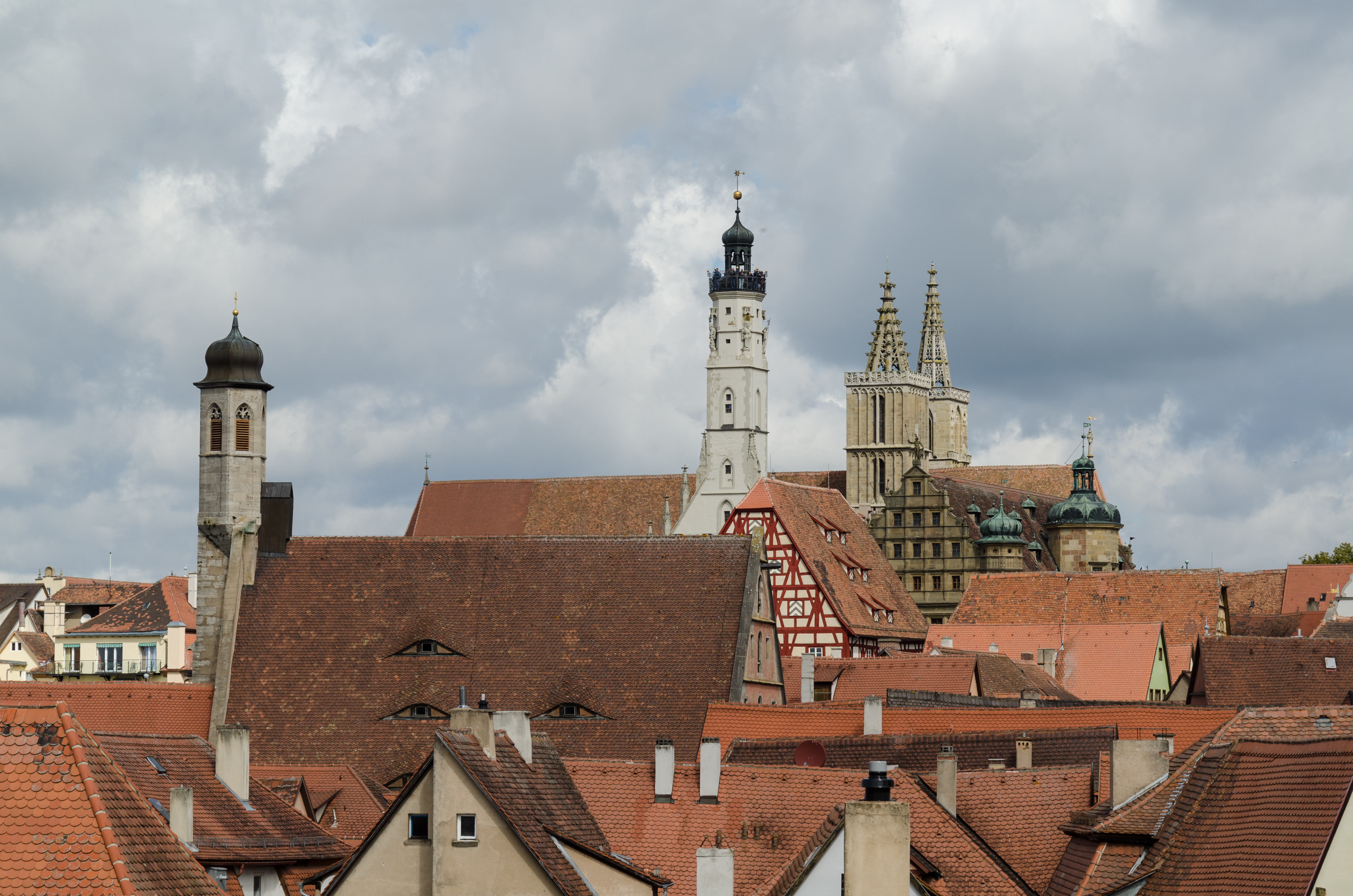 Rothenburg ob der Tauber, St. Johannis, Rathaus, St. Jakob